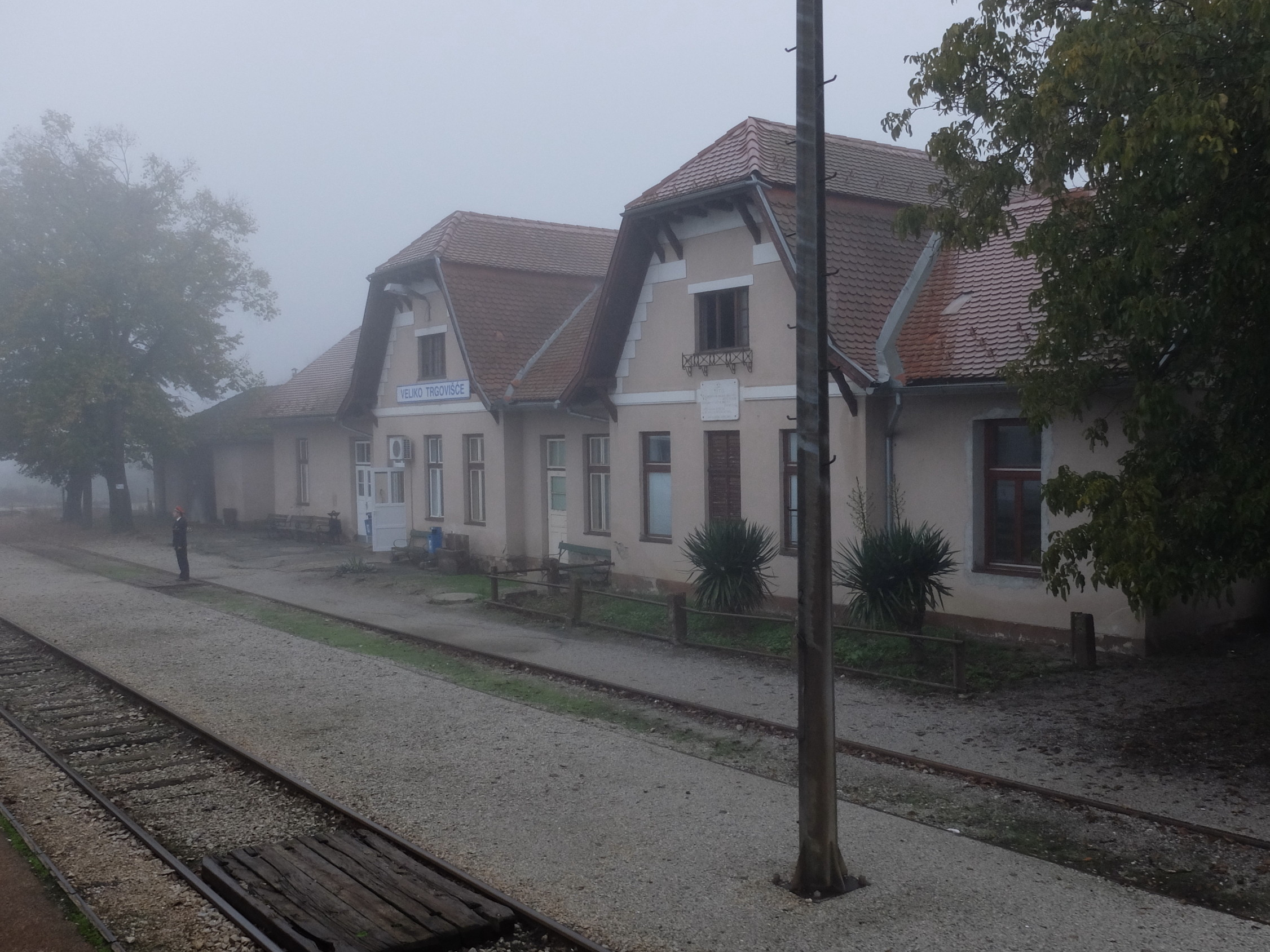 Veliko Trgovišće (Bahnhof)